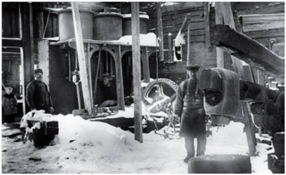 Robertsfors bruk, rivningen av stångjärnssmedjan